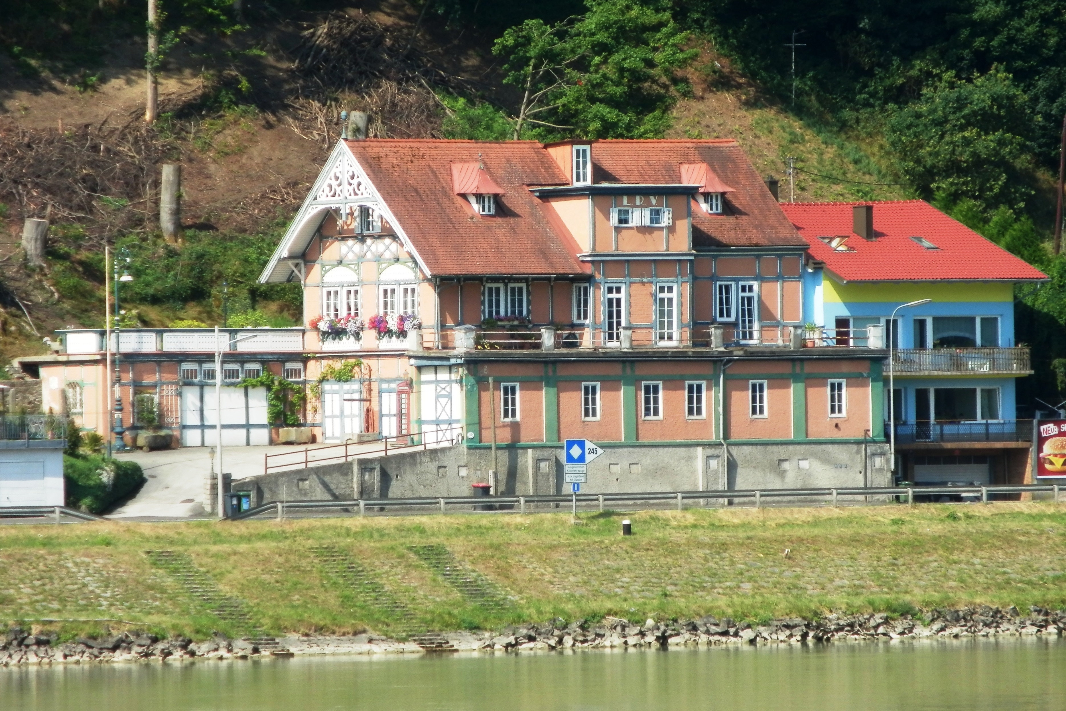 Vereins- und Boothaus der Polizeisportvereinigung (PSV) Linz/Linzer Ruderverein, Obere Donaulände